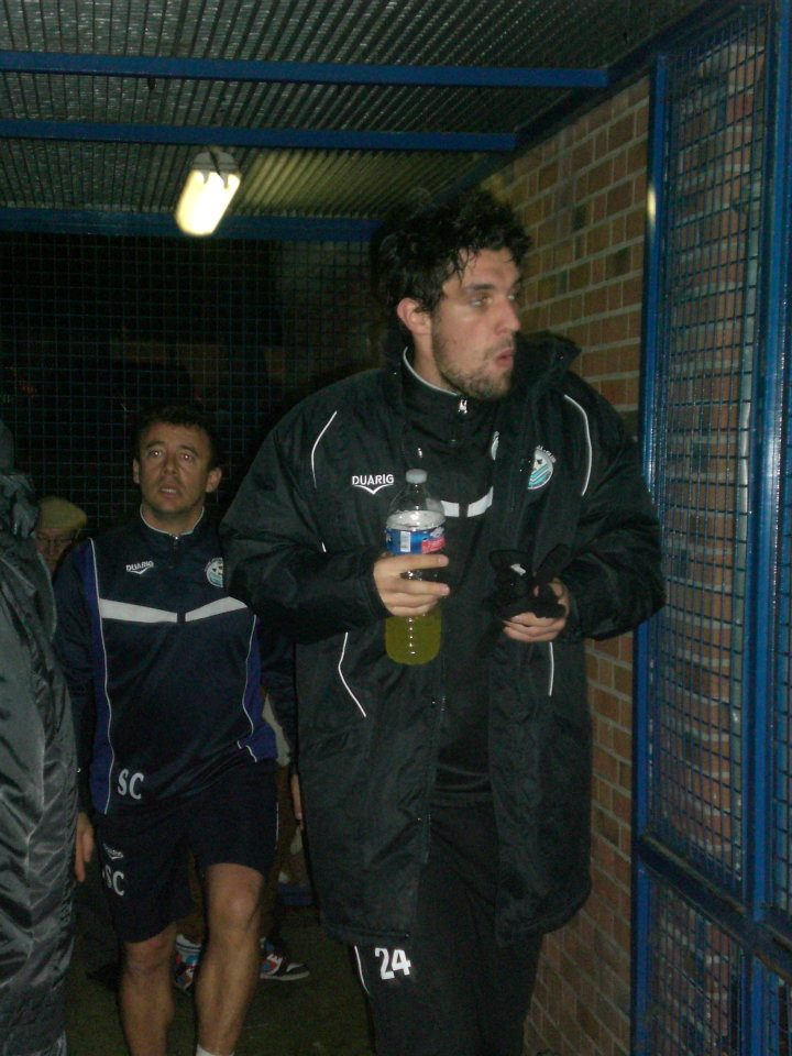 Photo du joueur Clément Fabre, lors du septième tour de la Coupe de France de Football à Avion le 19 novembre 2011